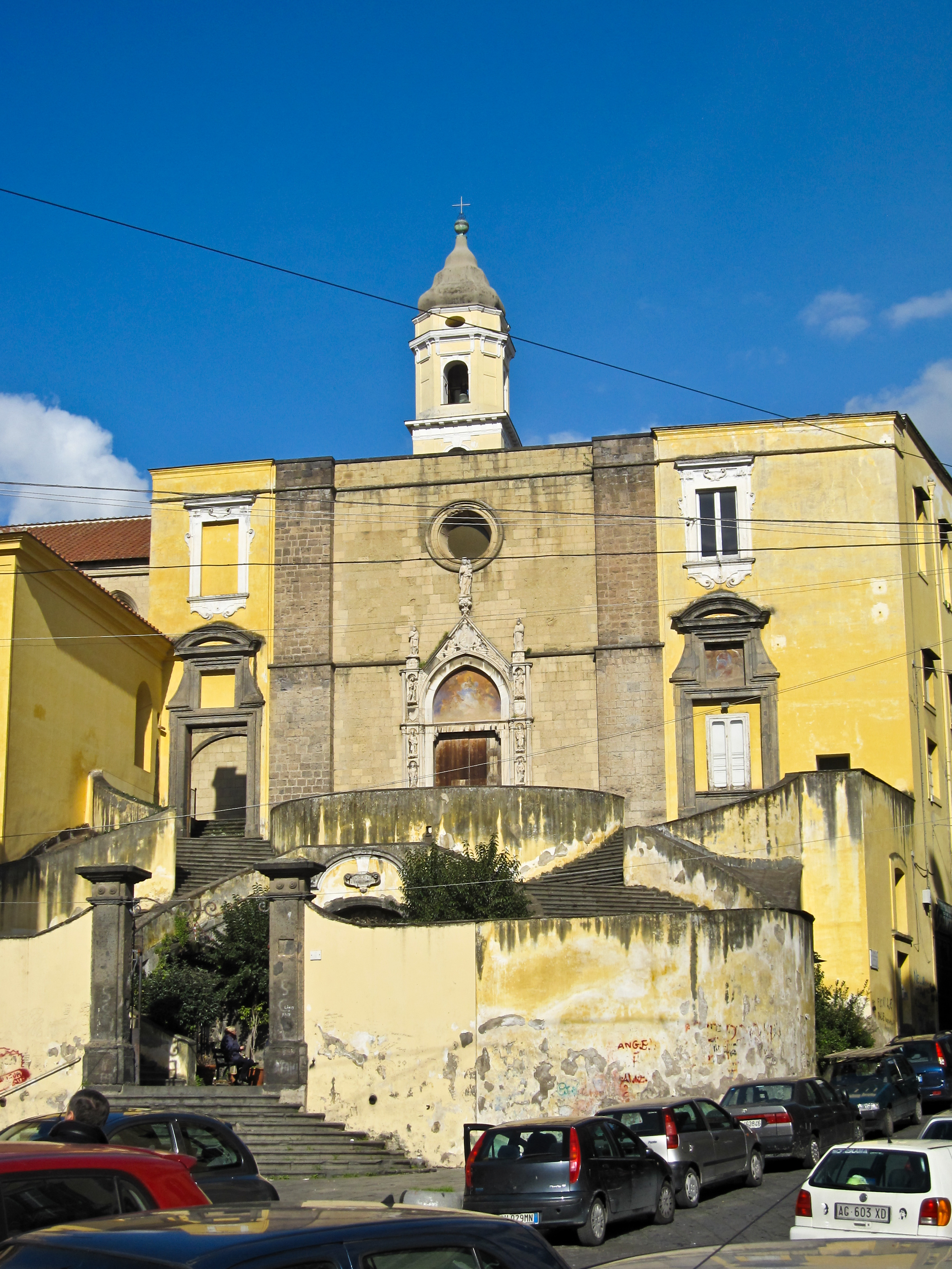 L'esterno con la scala a tenaglia. Chiesa di San Giovanni a Carbonara - Napoli